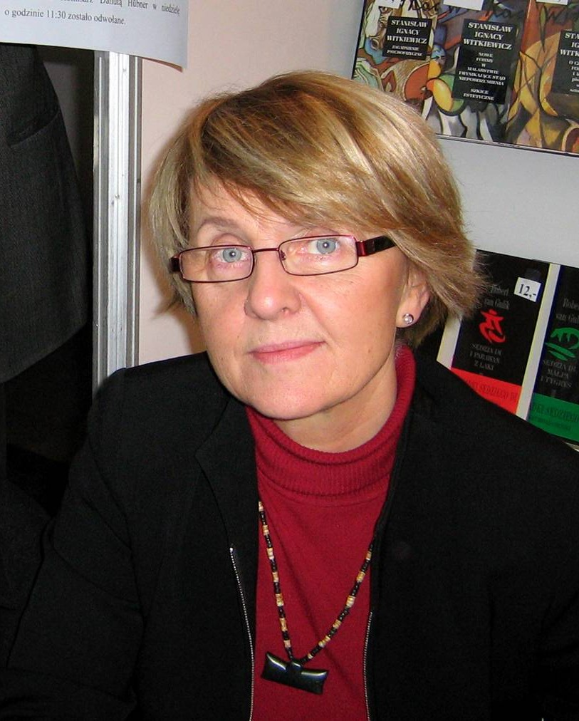 Danuta Hübner (ur. 8 kwietnia 1948 r. w Nisku nad Sanem) - polski polityk